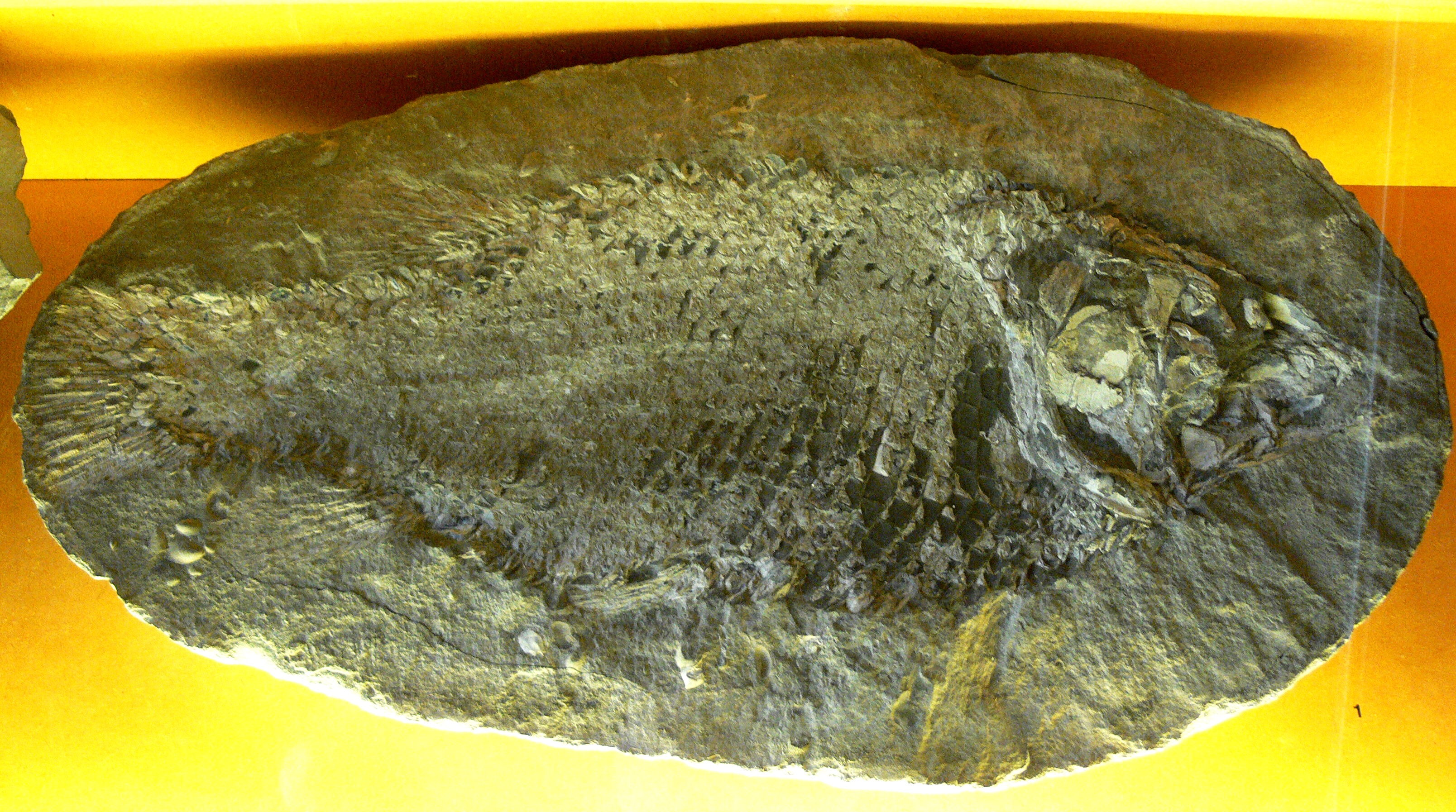 Lepidotes elvensis trouvé en 1883 dans les schistes de Saulx (Haute-Saône, France). Vesoul, musée Georges-Garret.